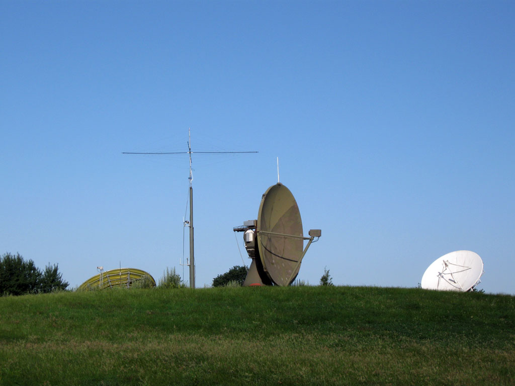 Satellitenanlage des Landesinstitutes IQSH Amateurstation DL0SHF